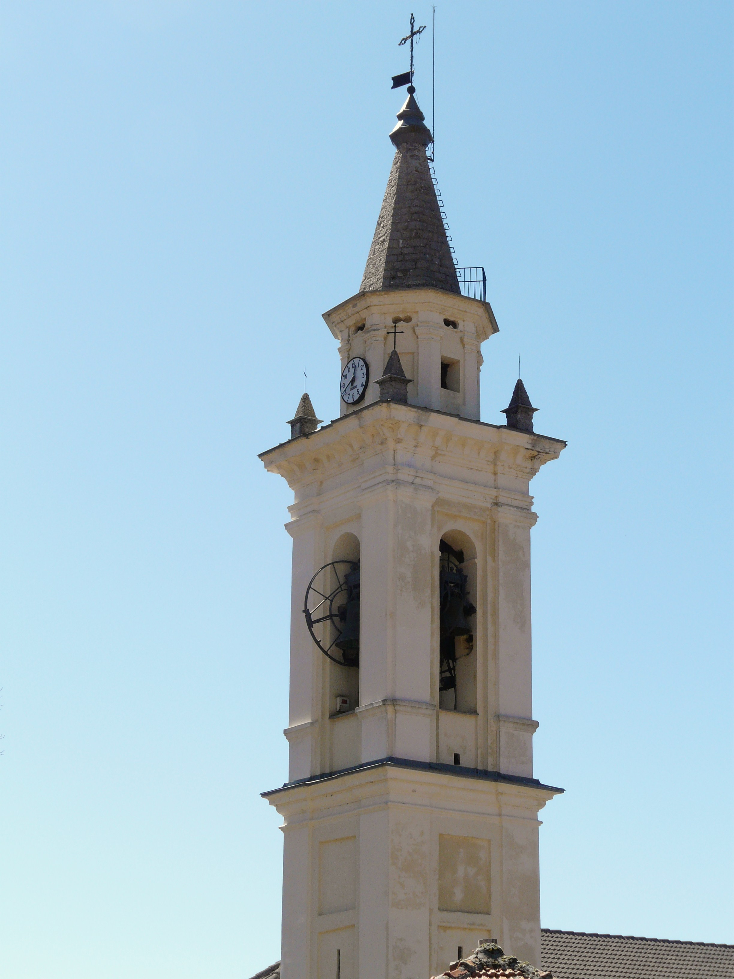 Chiesa di San Lorenzo, Propata, Liguria, Italia